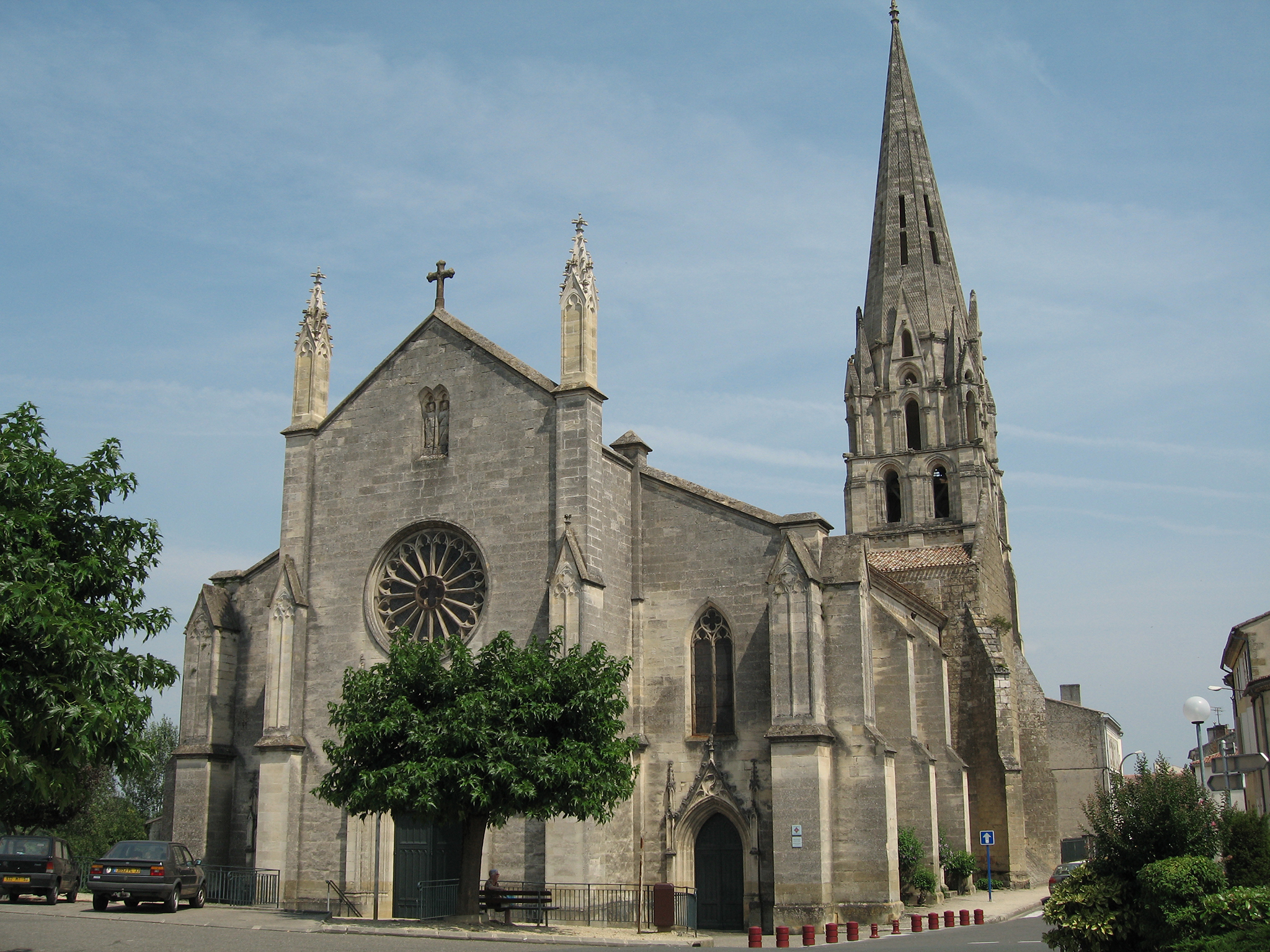 Langon, France.